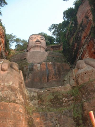 Riesen-Buddha von Leshan